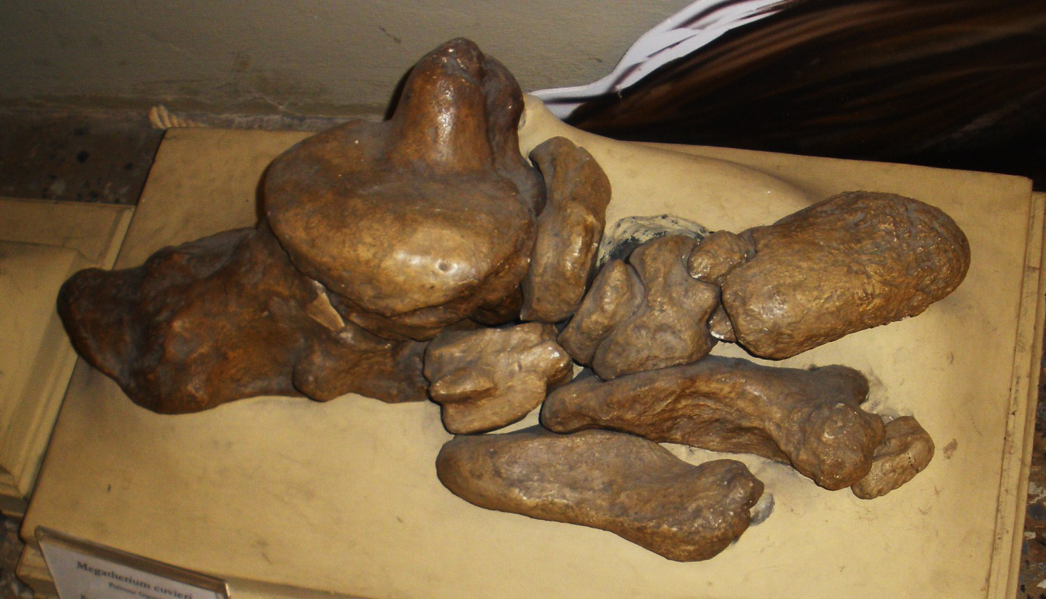 Fossil of Megatherium, an extinct mammal- Took the picture at Museo di Paleontologia di Firenze